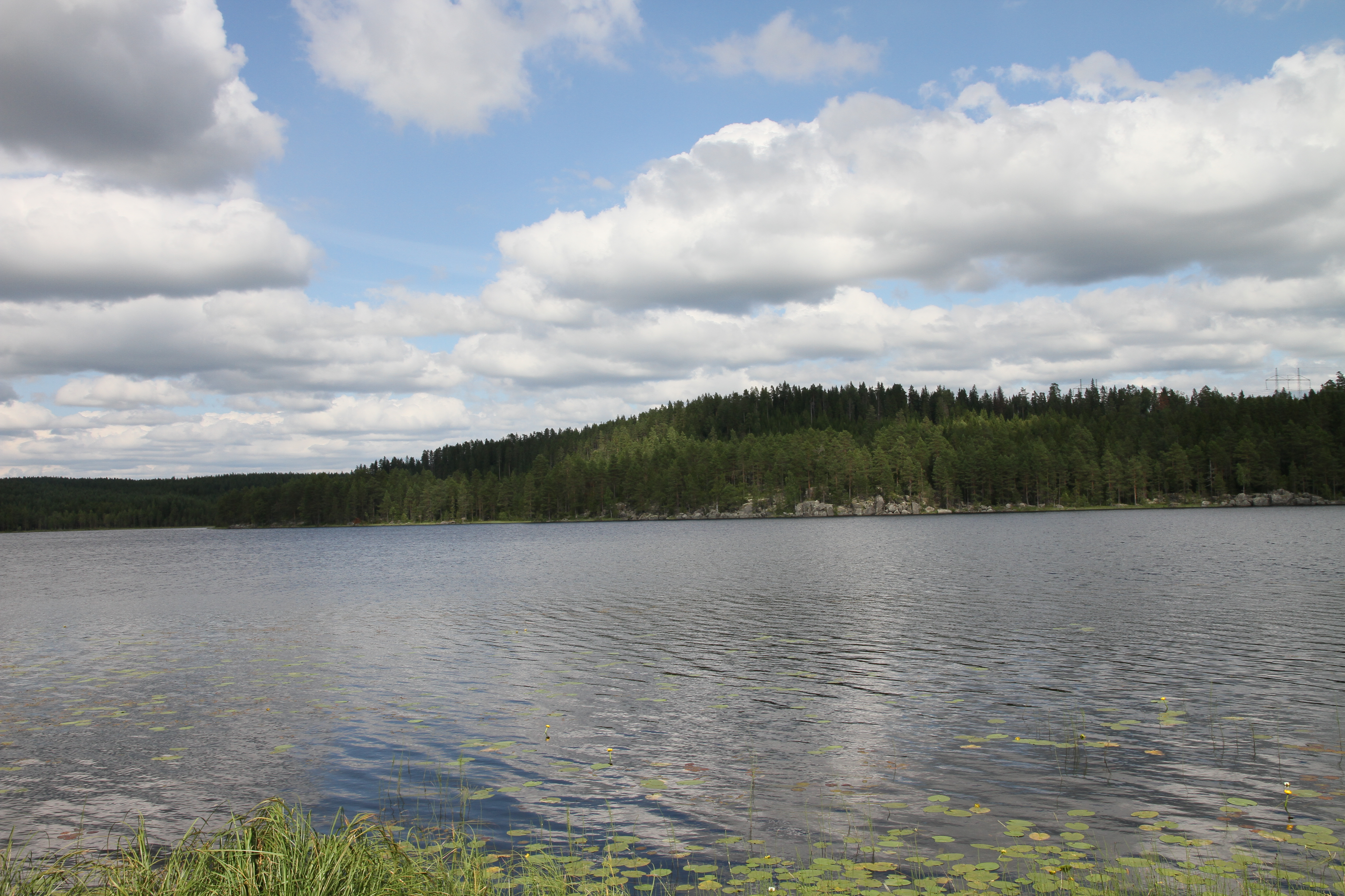 Almasjön (utanför Malung) fotograferad från rastplatsen vid E16.